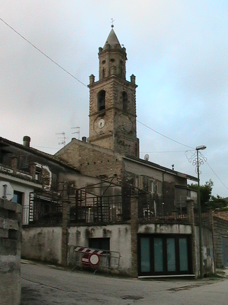 Scorcio